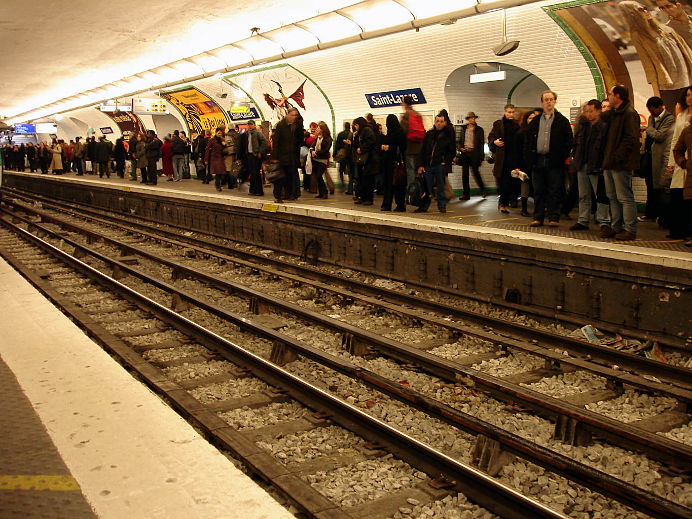 Métro de Paris (France) - ligne 13 - Station Saint-Lazare, mercredi 23 janvier 2008 à 18 heures Photo personnelle (own work) de Clicsouris